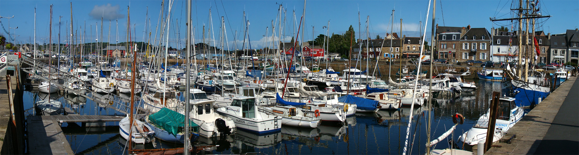 Paimpol, Côtes-d’Armor, Bretagne, France. À gauche: le Quai Morand, à droite: le Quai Duguay-Trouin.